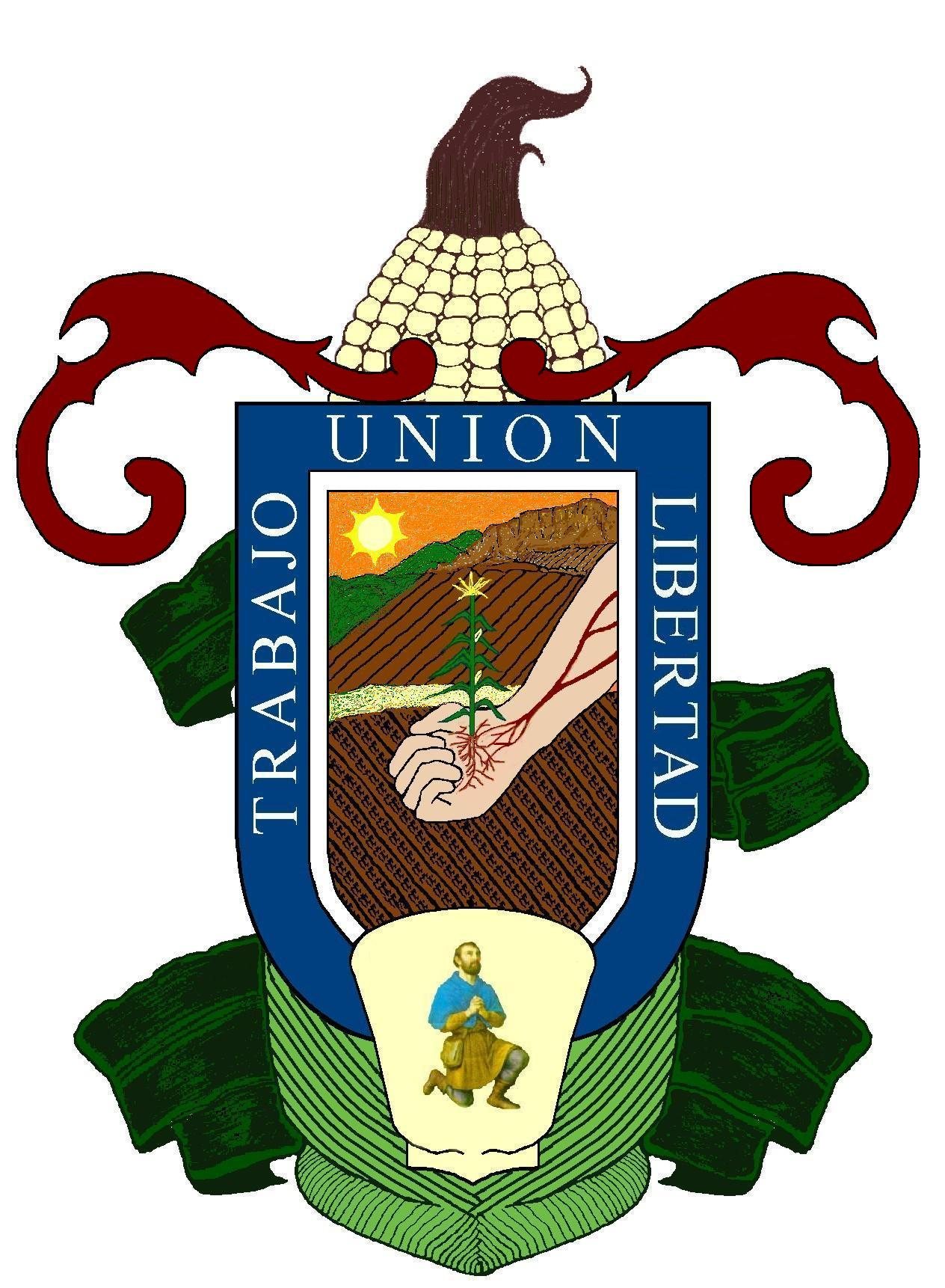 Escudo de Armas del Municipio de Gral. Enrique Estrada, Zacatecas.